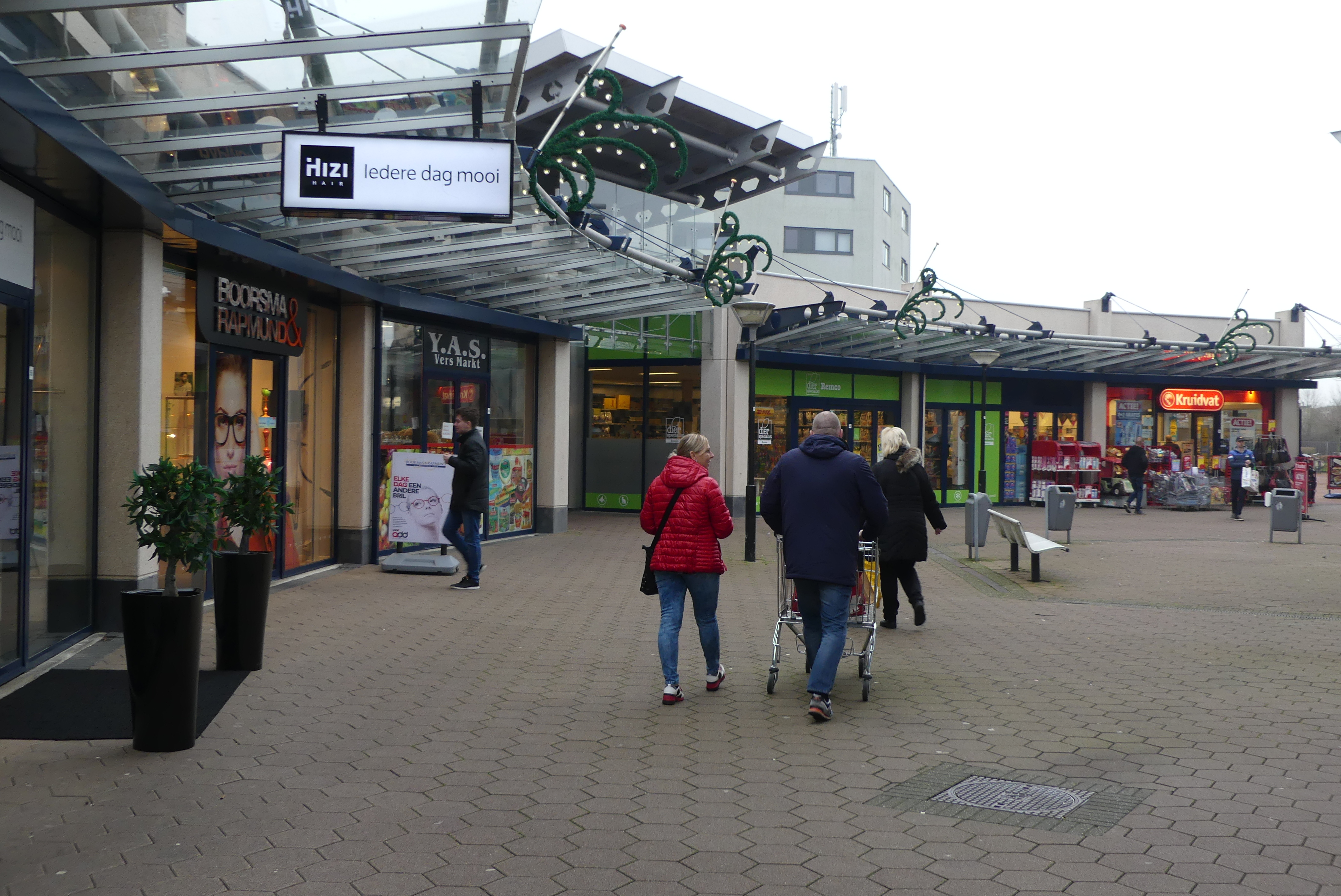 Winkelcentrum Maaswijk in Spijkenisse